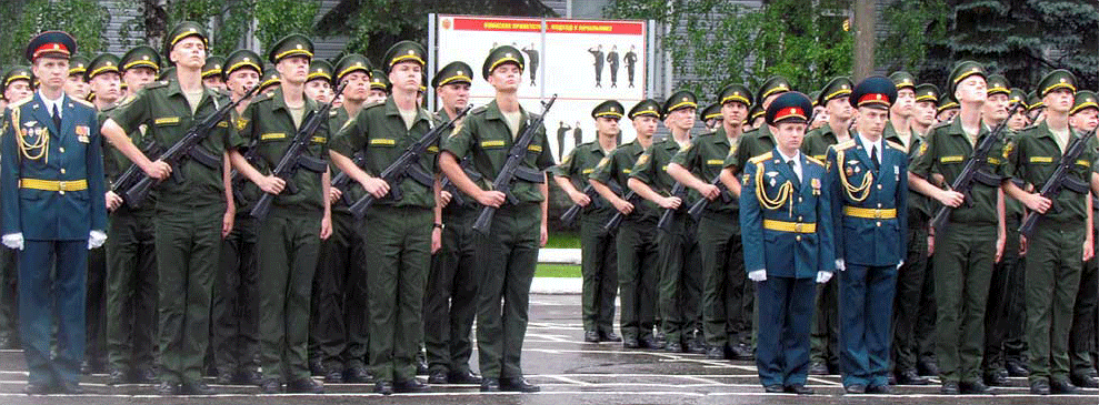 Семеновский полк